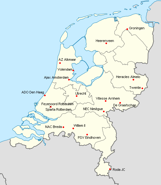 Liste des clubs participants à l'Eurodivisie 2008-09